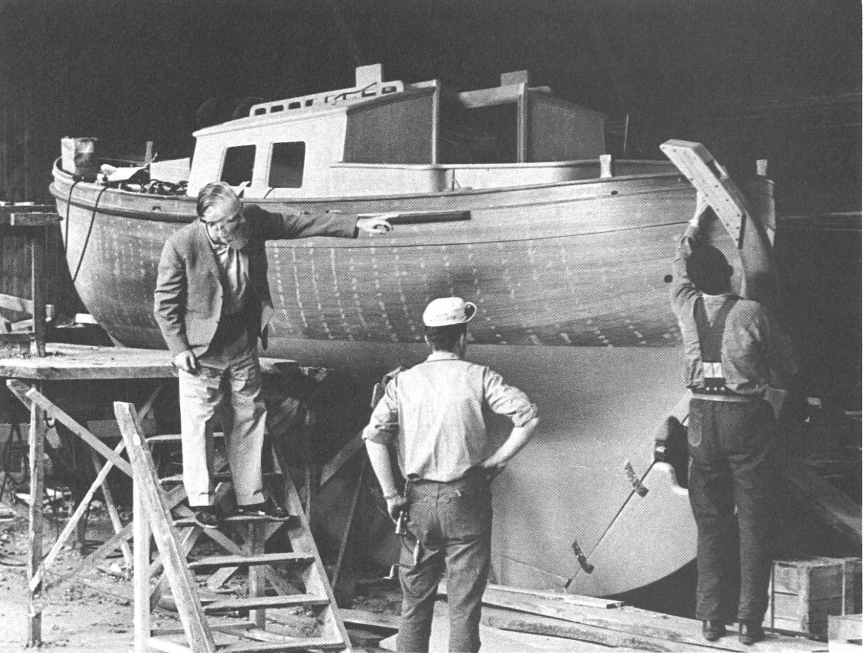 Björn Landström (1917–2002) valvomassa Antilia-veneensä rakentamista.